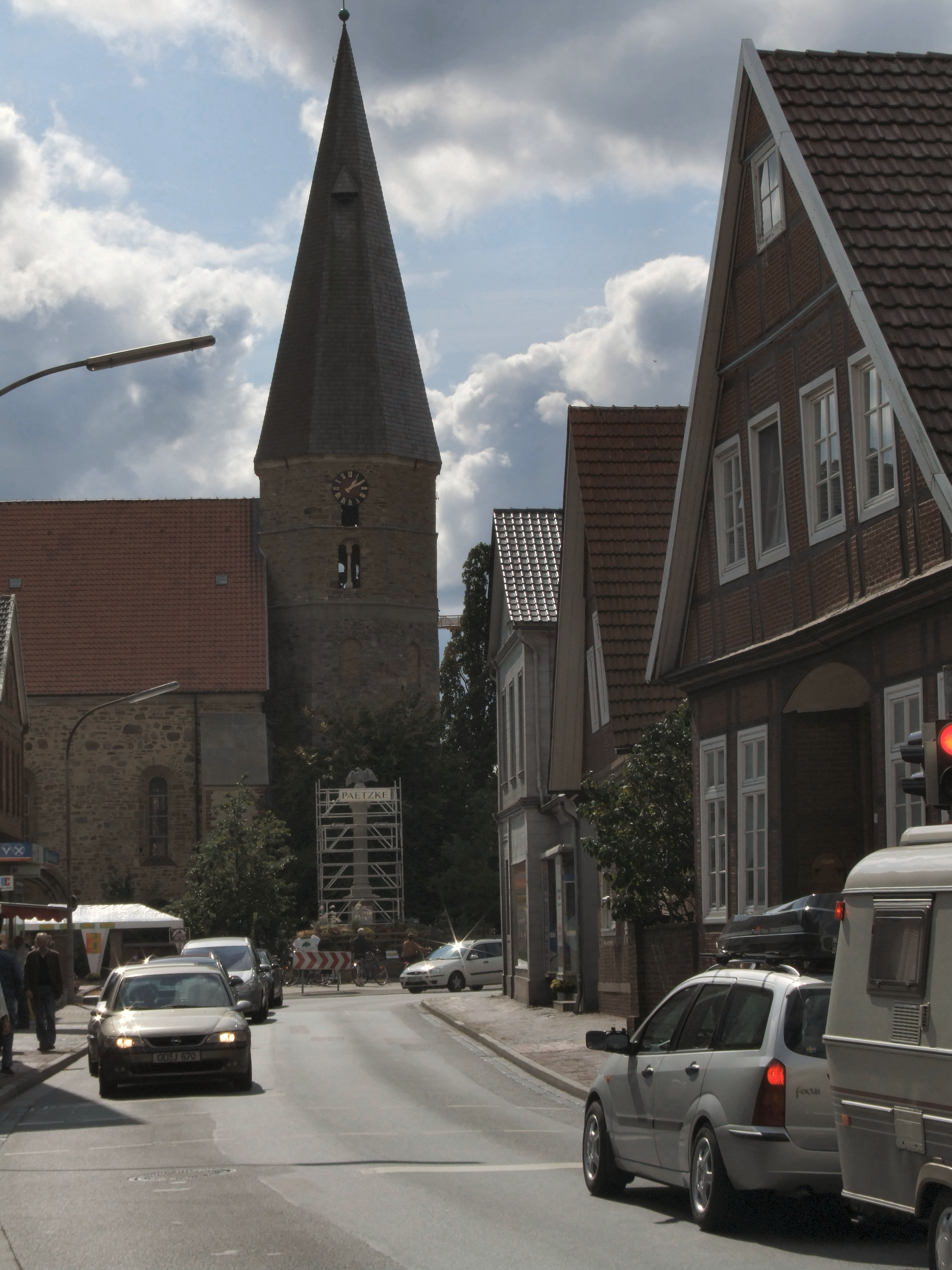 Sankt Georgskirche in Badbergen